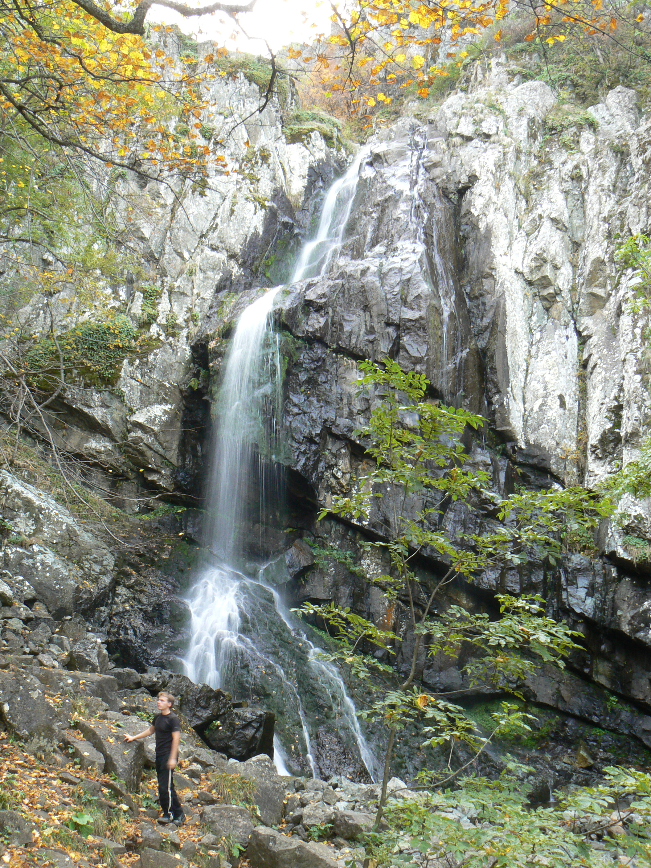 Боянски водопад